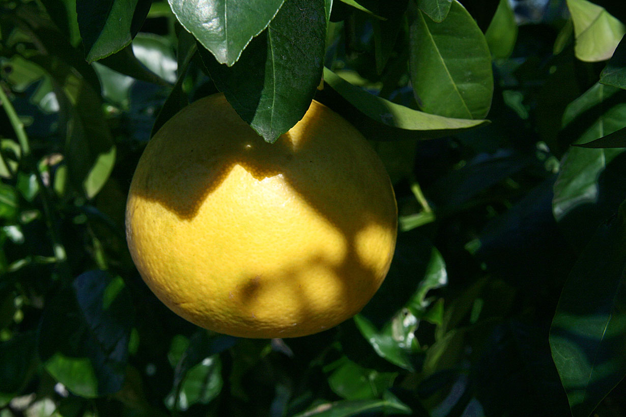 fruit d'Orobranco californien sur l'arbre fin janvier